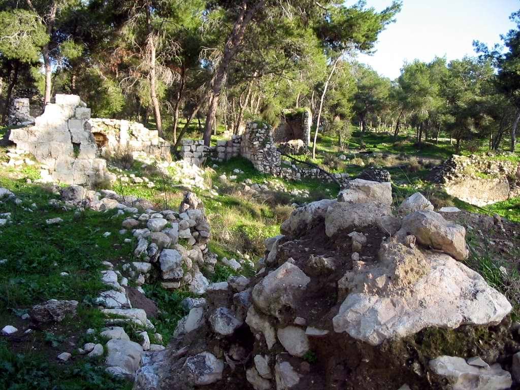 أحد المناظر في قرية قولة الفلسطينة